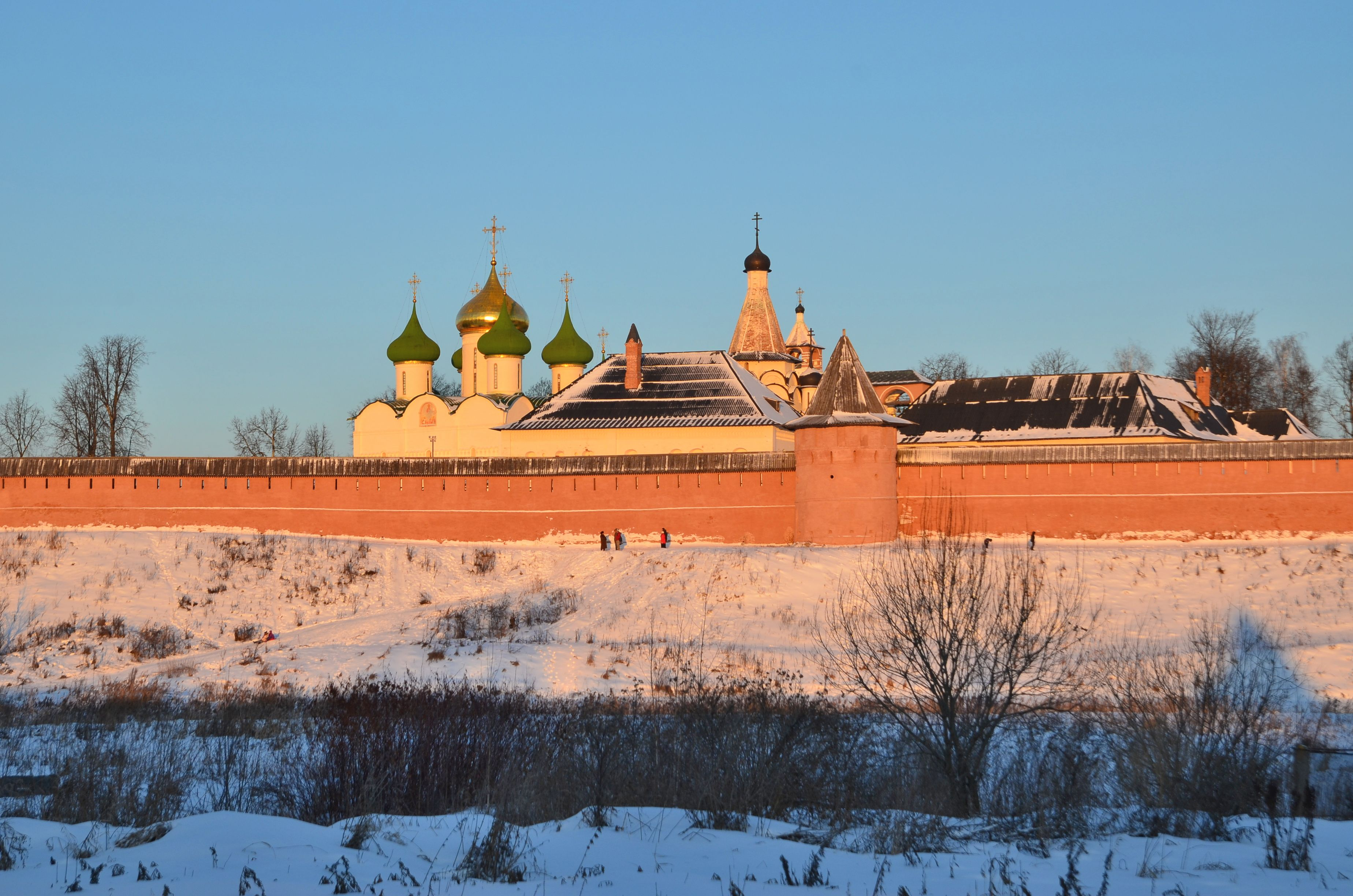 Ансамбль Спасо-Евфимиева монастыря: Ленина улица, 135, Суздаль, Суздальский район, Владимирская область